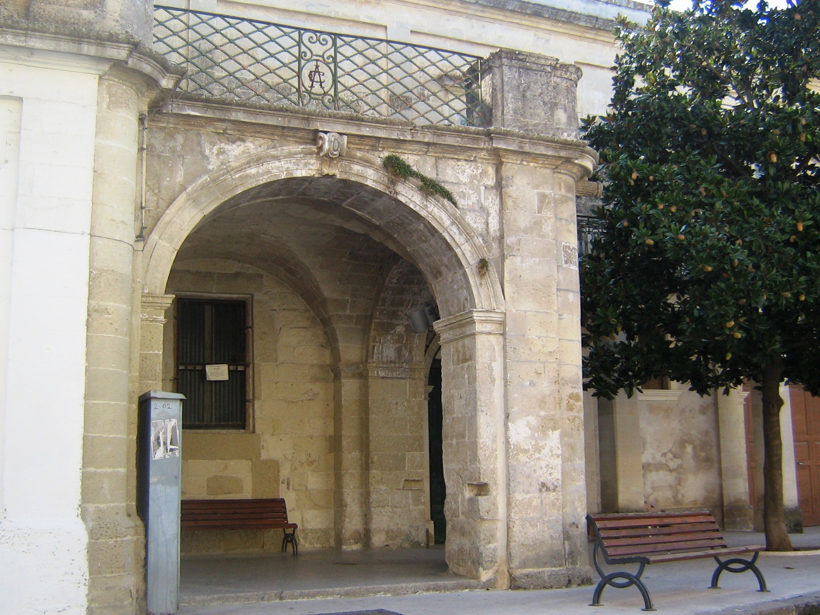 Seggio Cannole. Provincia di Lecce